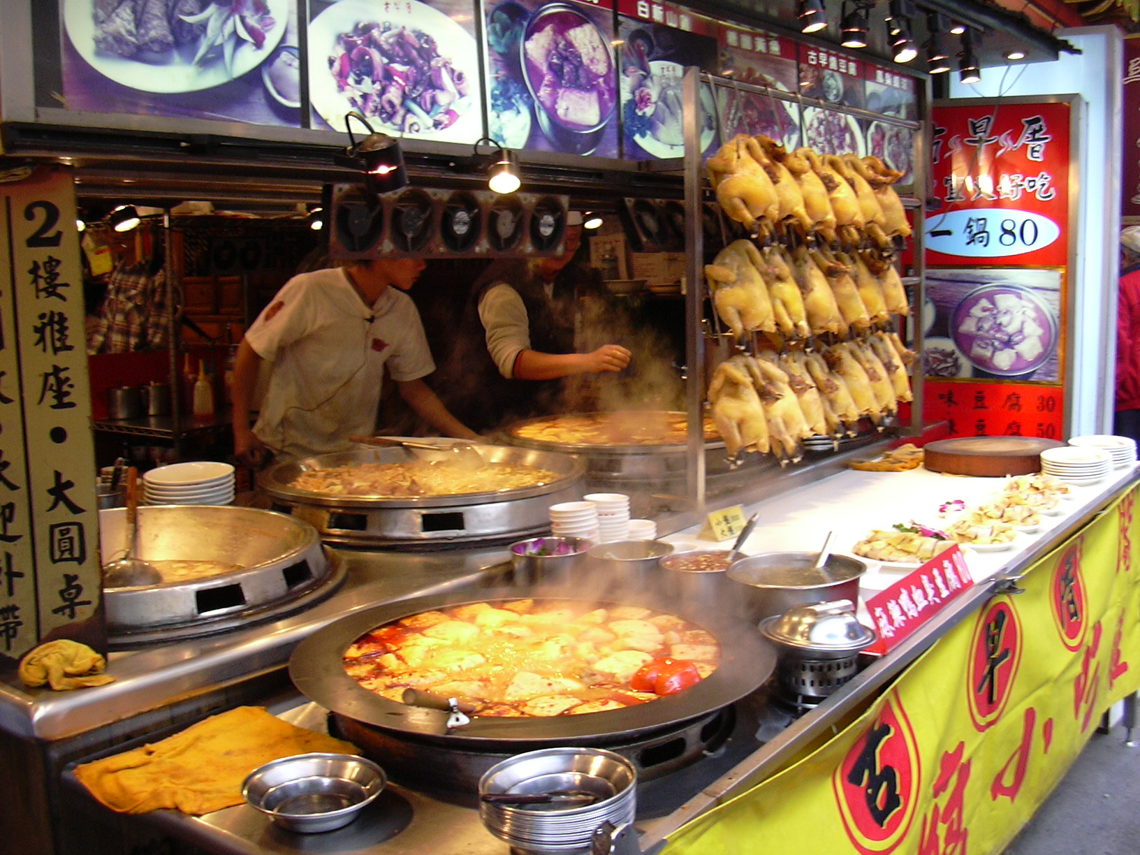 台北深坑老街。